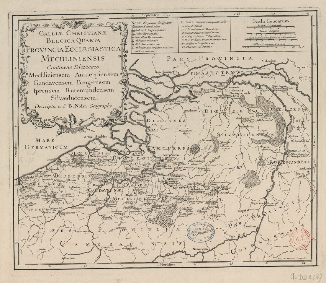 Carte de l'ancienne province ecclésiastique de Mechelen, insérée dans la Gallia Christiana (1715/1759).